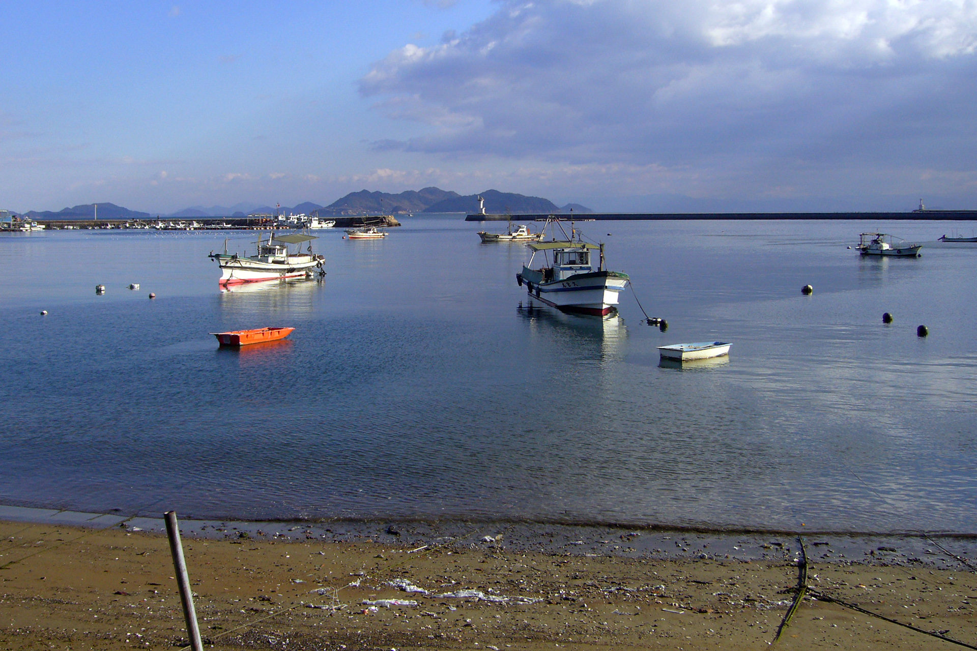 Tomonoura in Fukuyama, Hiroshima, Japan